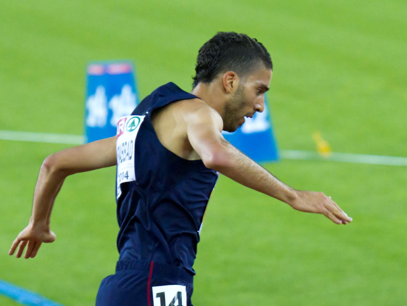 9047 mekhissi benabed 3000m Steeple